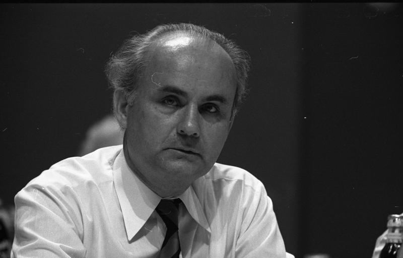 Außerordentlicher Parteitag der SPD in der Westfalenhalle Dortmund